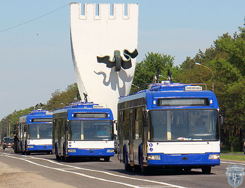 Брест закупил новые троллейбусы на автономном ходу